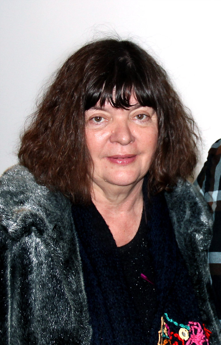 Место и време: Београд, 21.02.2012. Аутор: Бранко Ђурковић